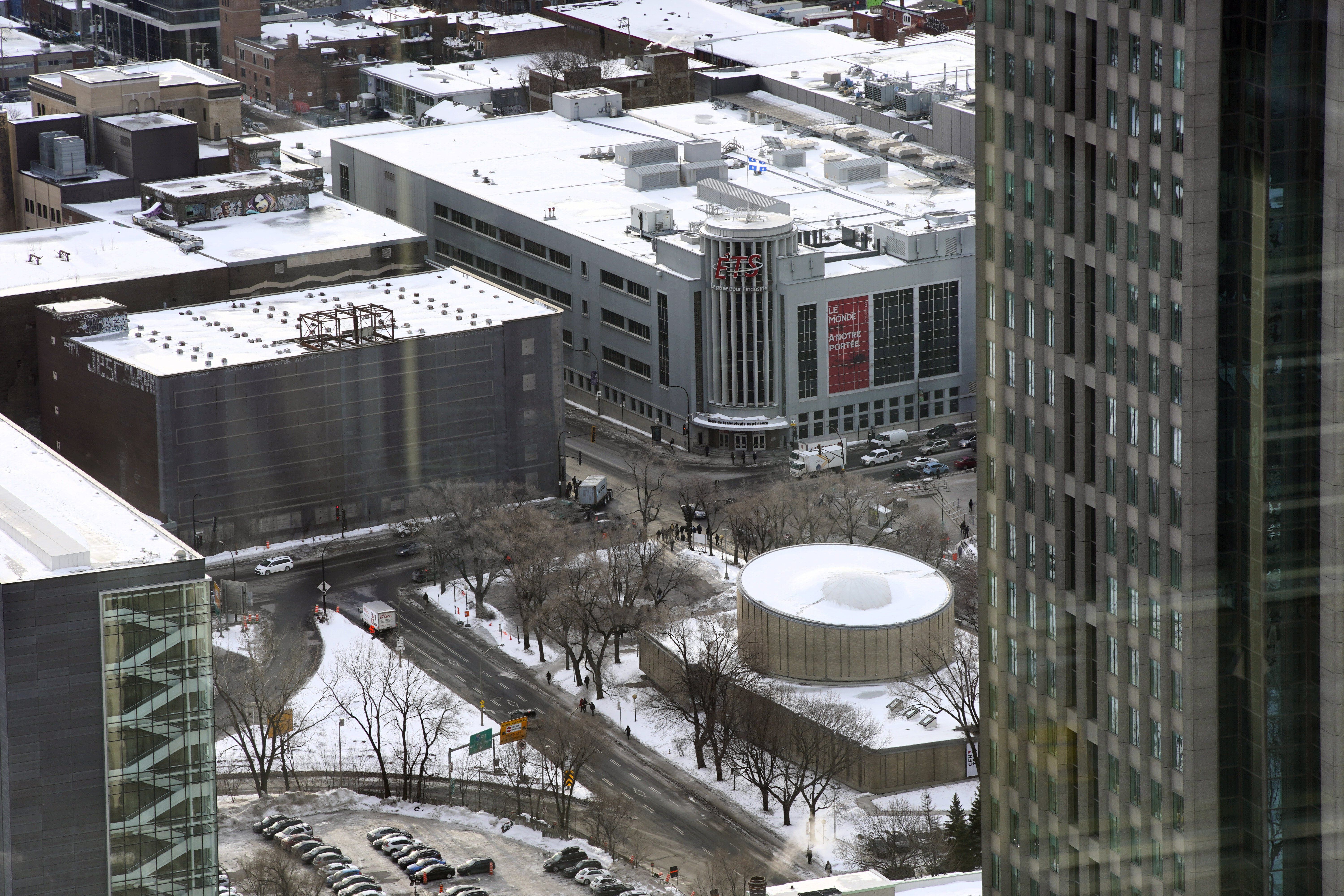 1, Place Ville Marie Montréal (Québec) H3B 2G2